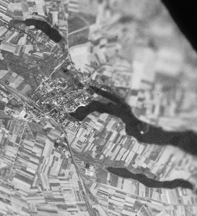 Chełmża i pobliskie jeziora sfotografowane przez amerykańskiego satelitę wywiadowczego Corona 98 (KH-4A 1023) w dniu 23 sierpnia 1965 r.